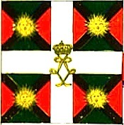 Arquebusiers de Grassin drapeau d'Infanterie XVIIIe siècle